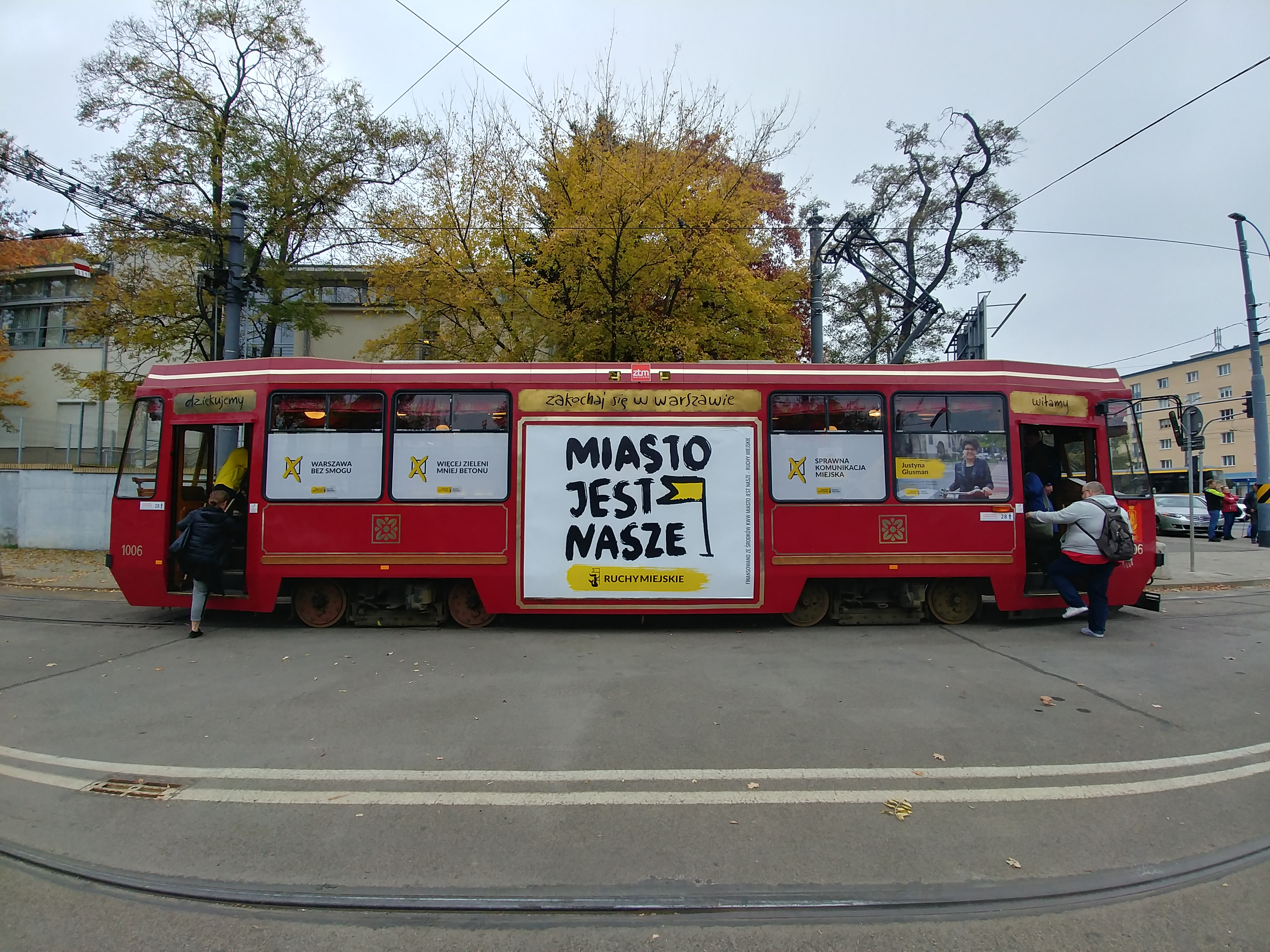 Zabytkowy tramwaj używany przez Miasto Jest Nasze podczas kampanii wyborczej w 2018.